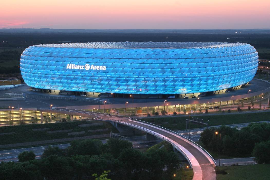 (no longer available)